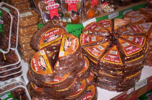 Pan de Higo